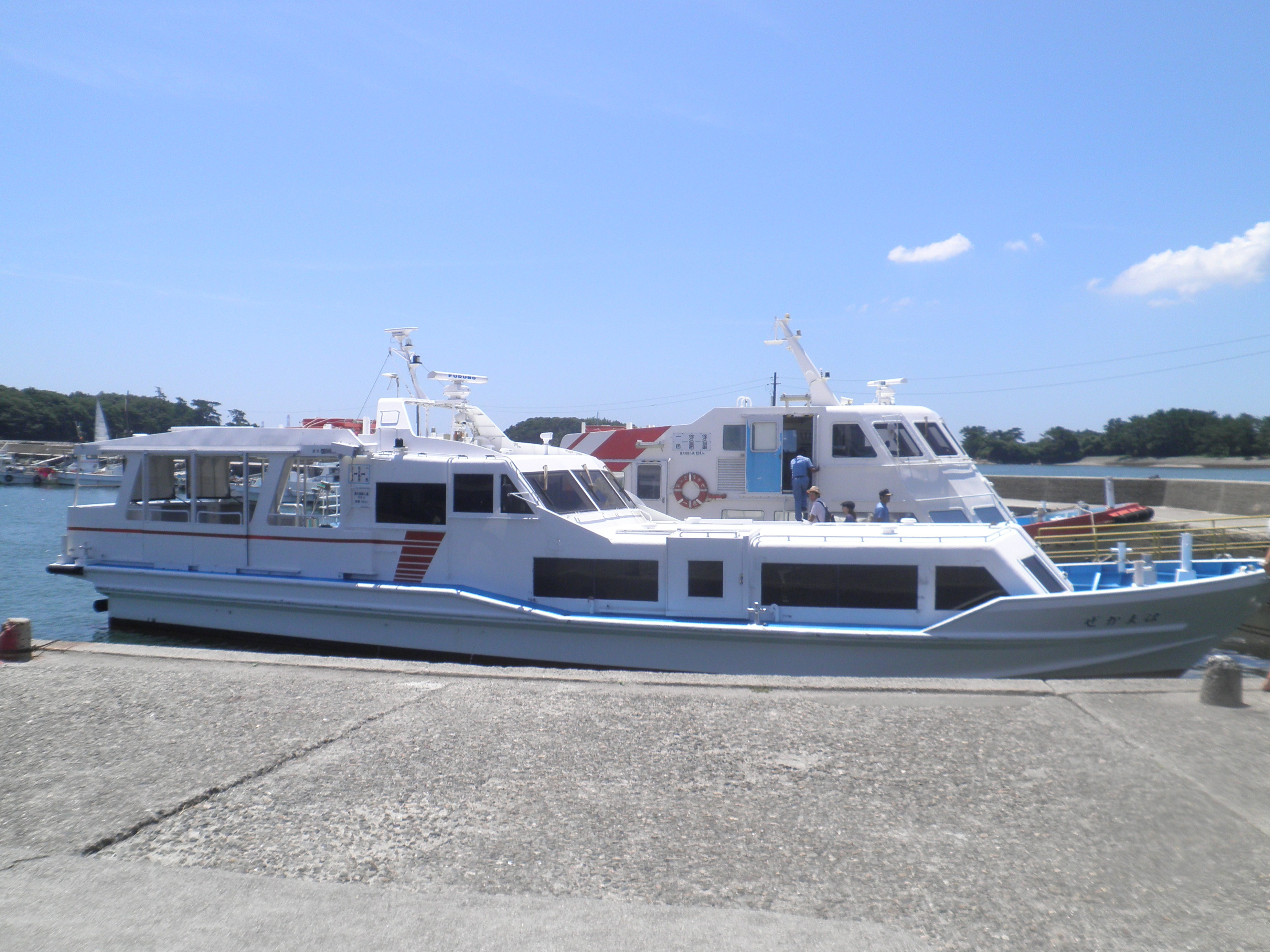 佐久島航路に就航する一色町営渡船「はまかぜ」